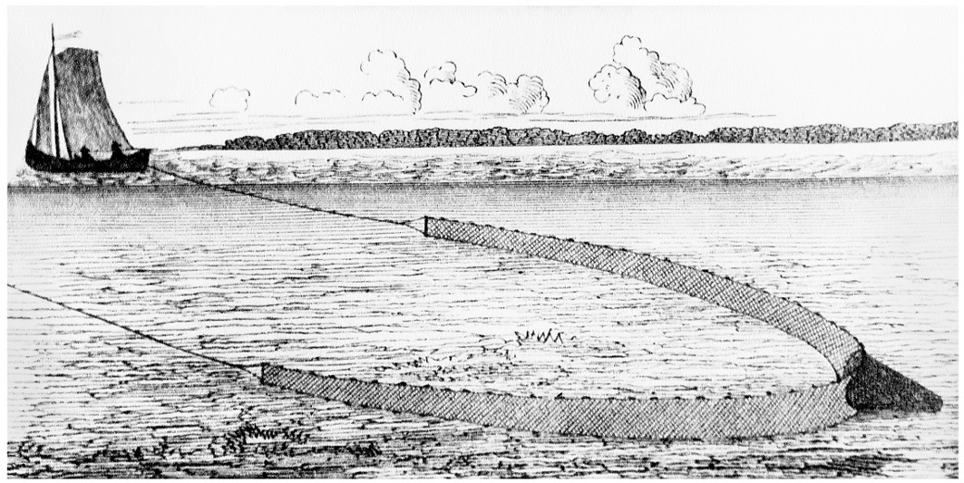 Das Braddengarn (oder Braddennetz) - ein einwandiges Zugnetz mit Sack und zwei bis 180 m langen Flügeln - wurde grundsätzlich von 2 Kähnen gezogen